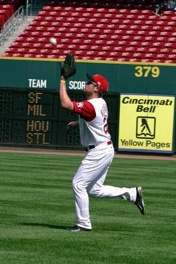 Baseball, Outfielder, 2004, by Rick Dikeman 03:43, 16 September 2004 . . Rdikeman . . 360×540 (56,673 bytes)